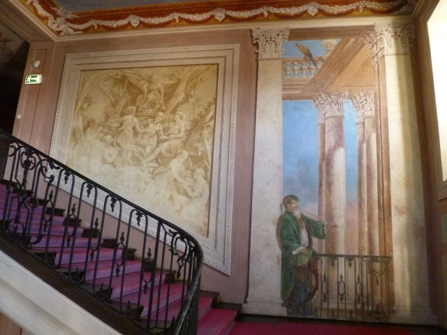 Schloss Zell an der Pram: Treppenstiege